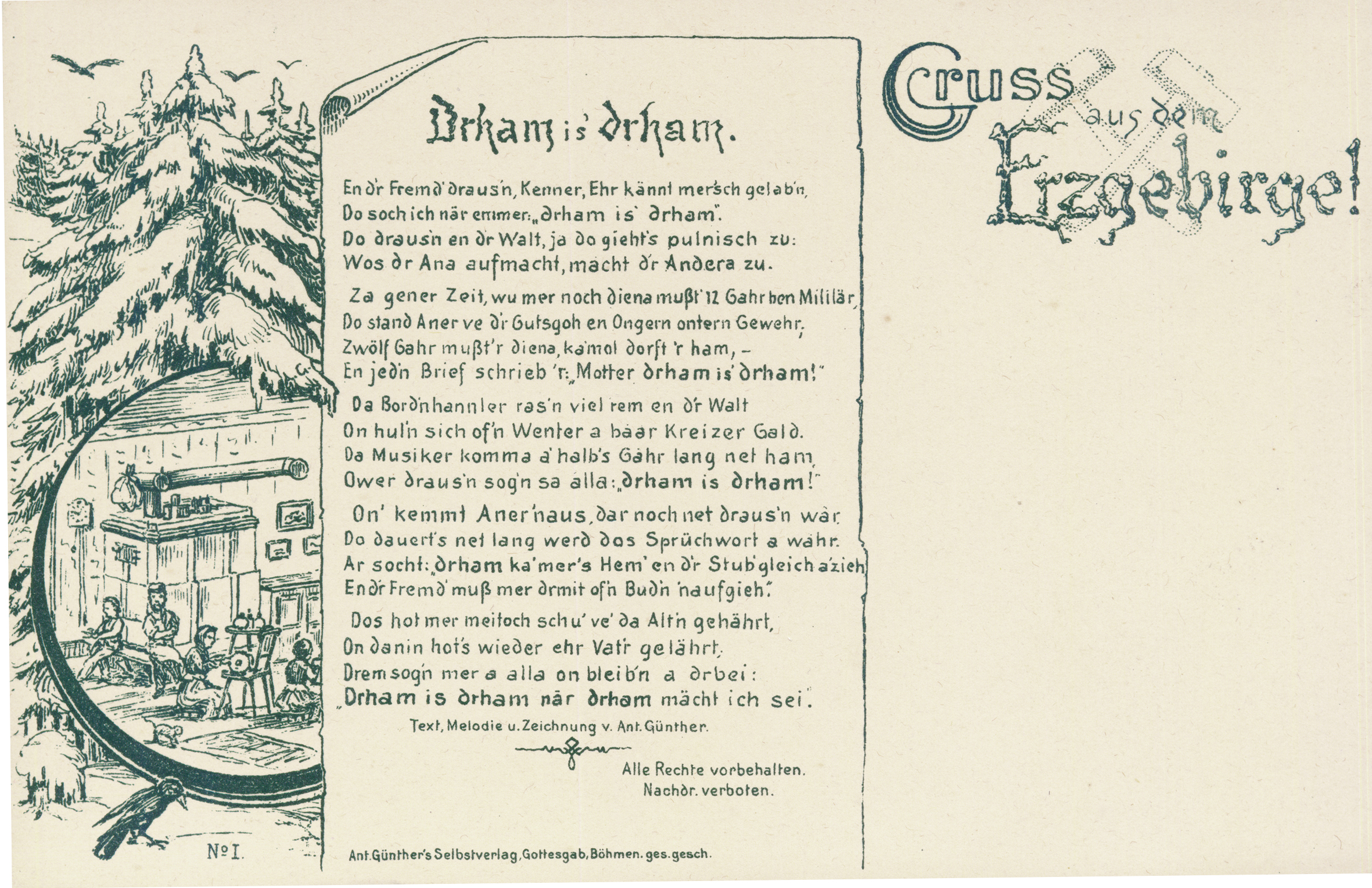 Die erste Liedpostkarte der Welt von Anton Günther mit dem Motiv Drham is' d'rham aus dem Jahr 1896 in einer Version ca. 1902